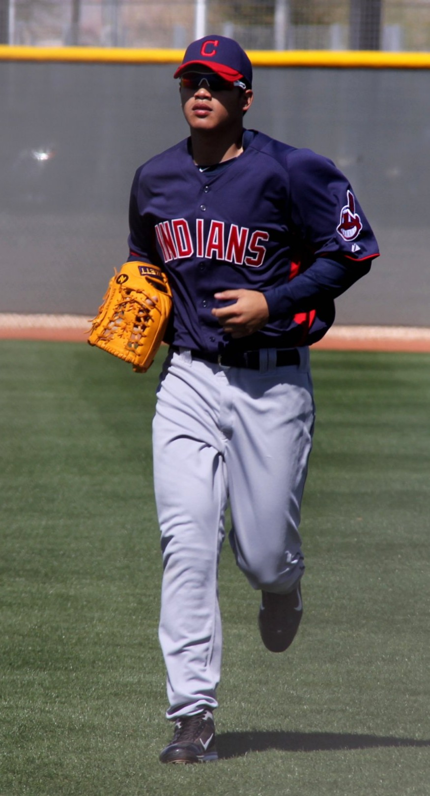 林家慶效力於克里夫蘭印地安人隊時期。